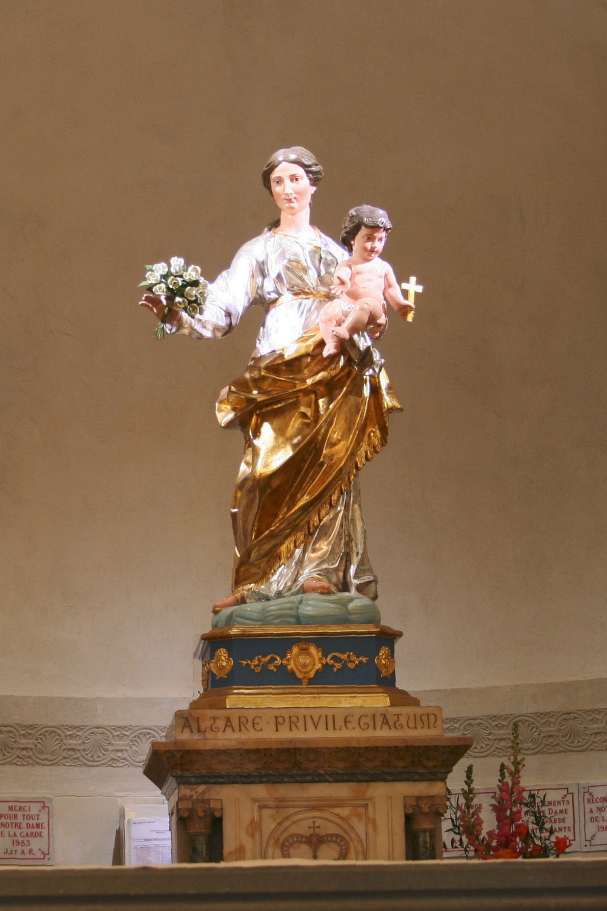 Vierge au bouquet située dans la crypte de la basilique Notre-Dame de la Garde. Statue du XVIII° siècle.